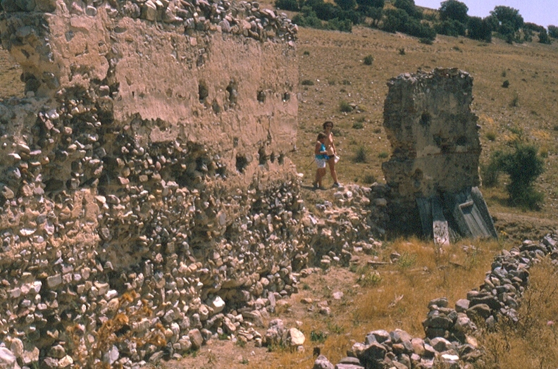 1995, en julio